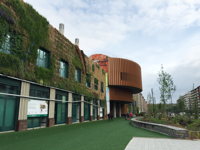 Foto del exterior del Palacio de Europa en el que se aprecia la fachada.